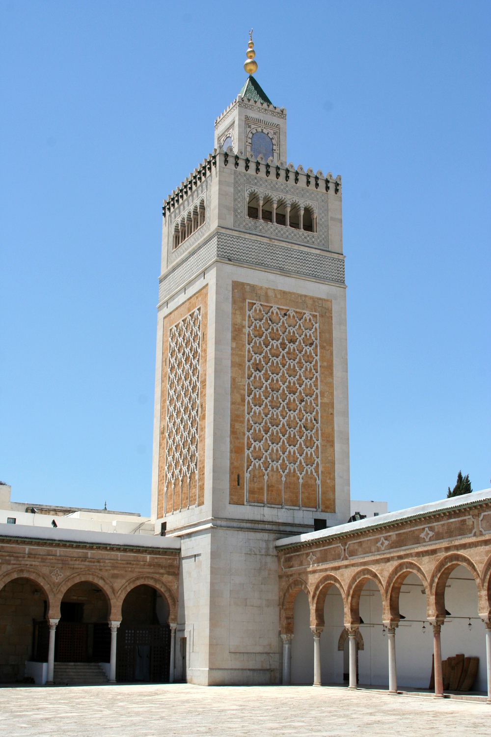 Mosquée Zitouna à Tunis (Tunisie)